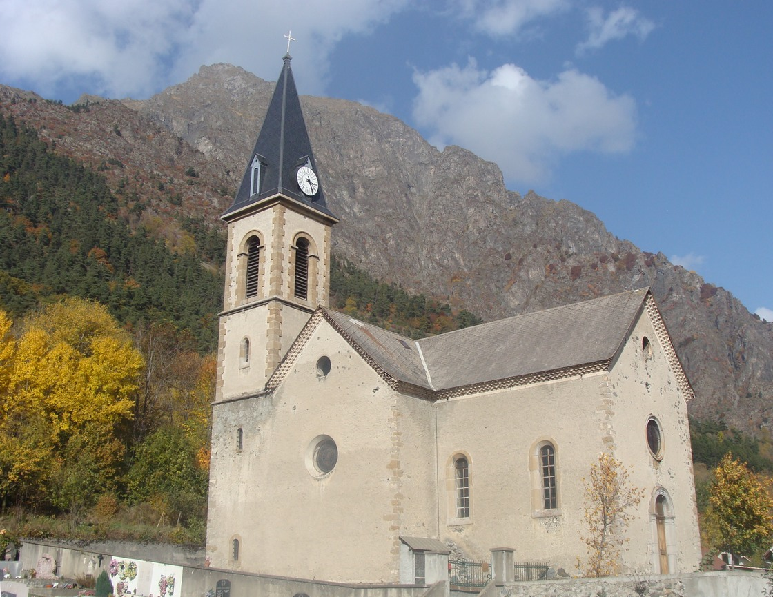 L'église de la Motte-en-Champsaur. Façade style haut-alpin (porte avec arc, oeil de boeuf), clocher latéral à 3 étages et flèche, transept.